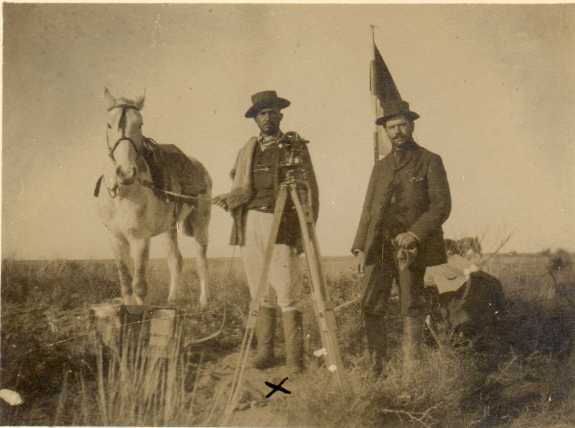 Ingeniero Carlos de Chapeaurouge (1846-1922) diseñador de la traza urbana de numerosos pueblos de la Provincia de Buenos Aires a fines del siglo XIX.